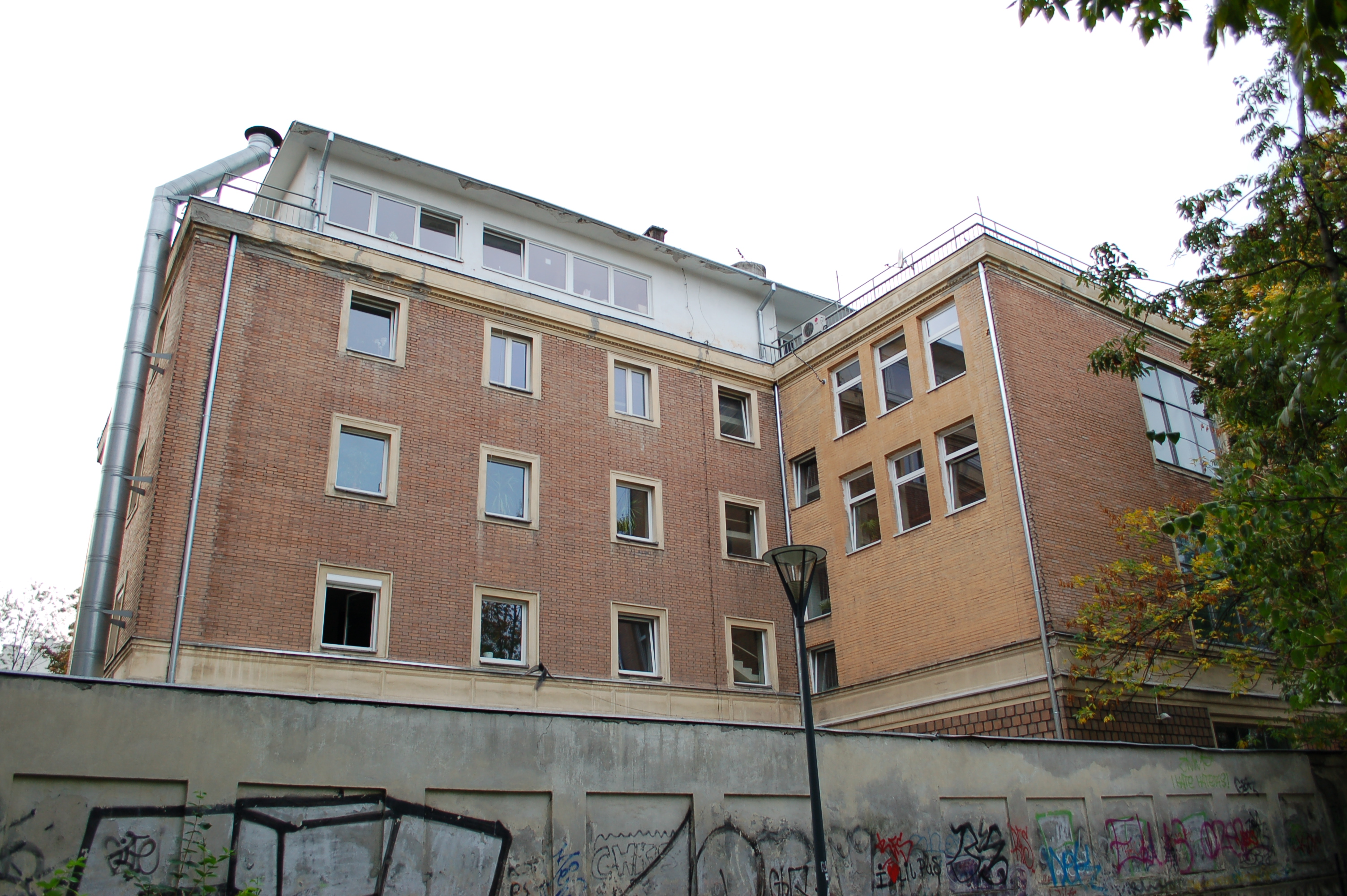 Foksal, Warschau